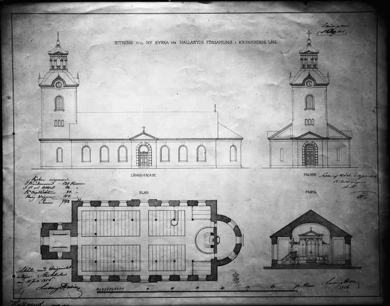 Ritning av kyrkan 1856. Avfotograferad. Kategori: (01) ExteriörerRitning av kyrkan 1856. Avfotograferad.